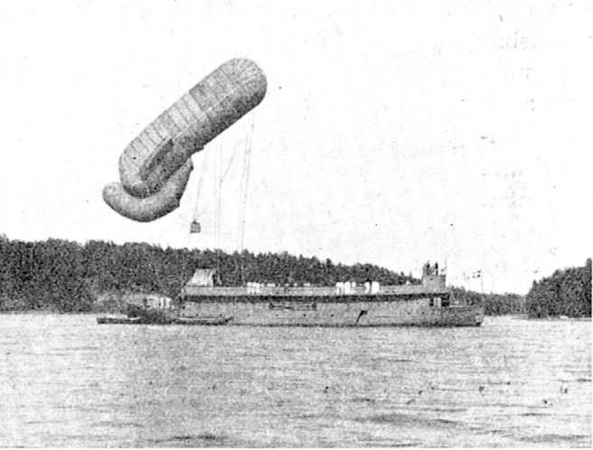 Ballongfartyget No 1